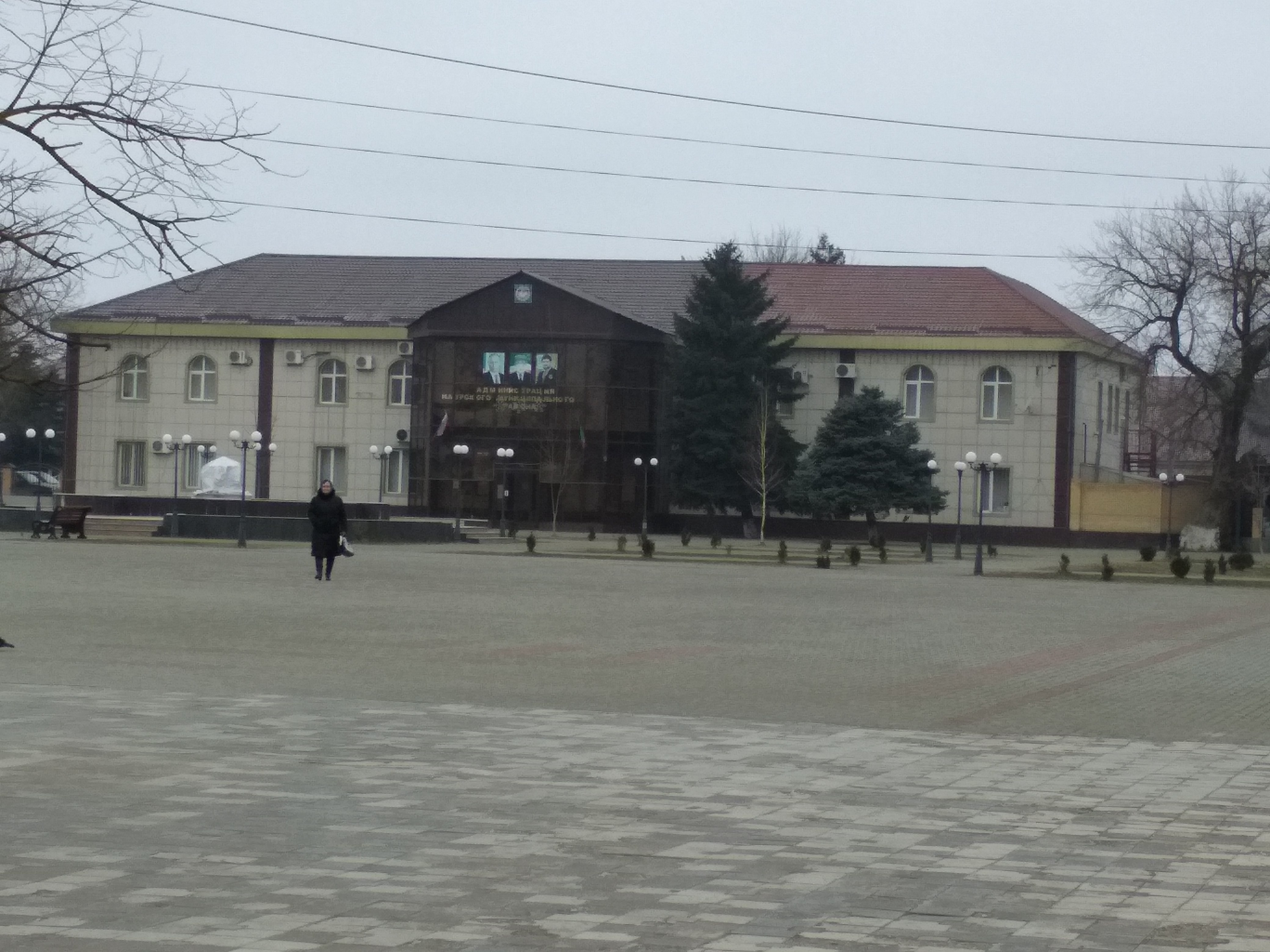 Нохчийн: Здание районной администрации